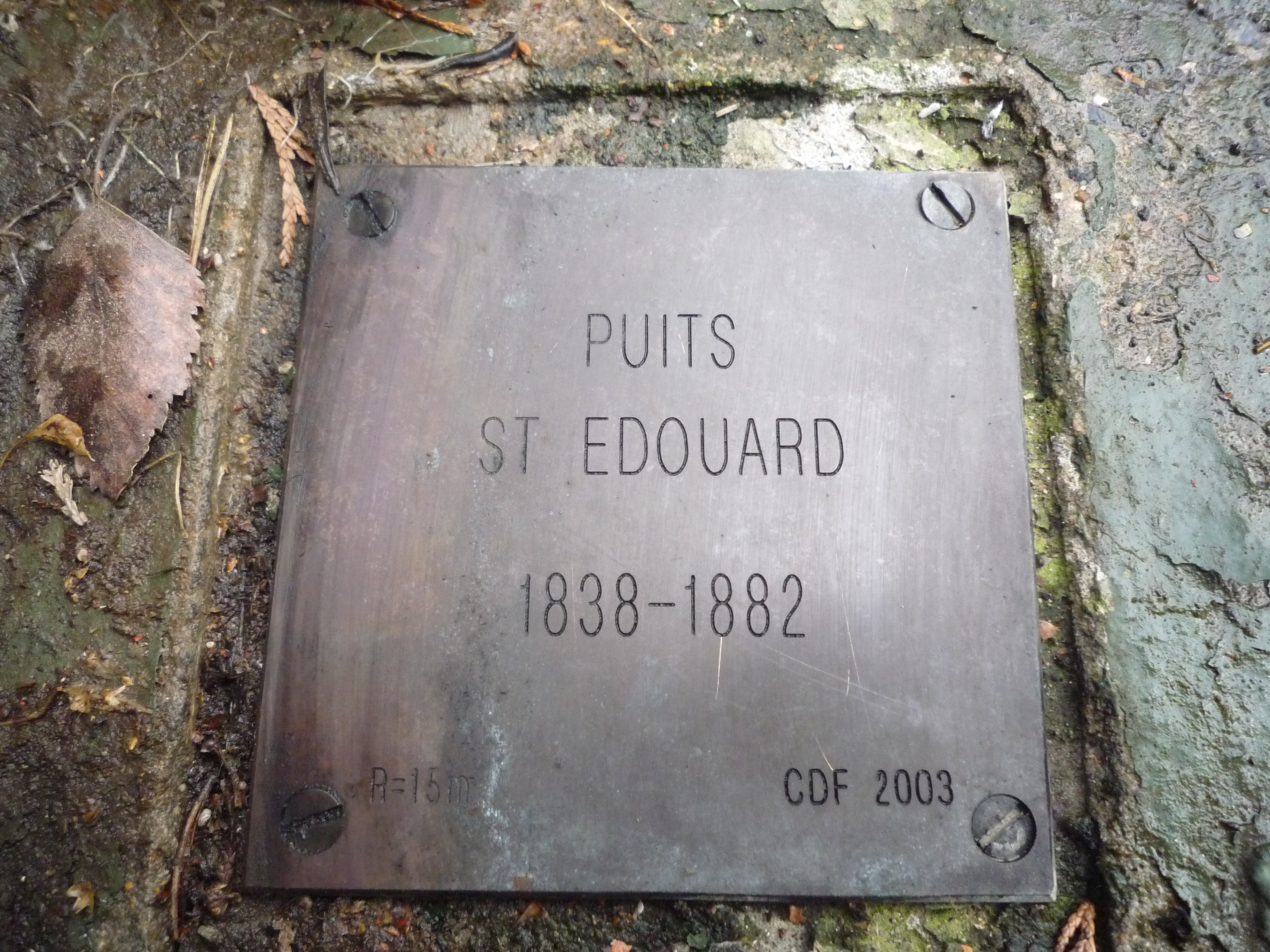 La Fosse Saint Édouard de la Compagnie des mines d'Azincourt était un charbonnage constitué d'un seul puits situé à Aniche, Nord, Nord-Pas-de-Calais, France.